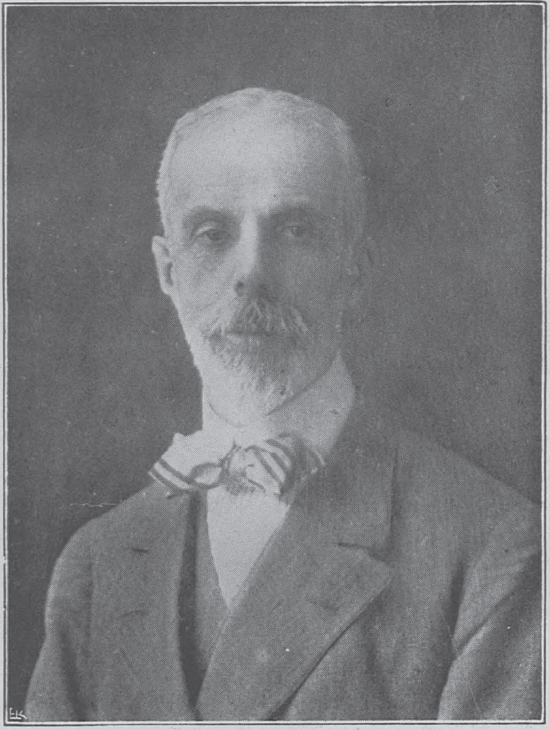 griechischer Bänker und Politiker 19.-20. Jahrhundert